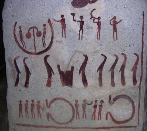 slab of the "King's Grave"; compare Image:Kiviksgraven, en av hällarna, Nordisk familjebok.png